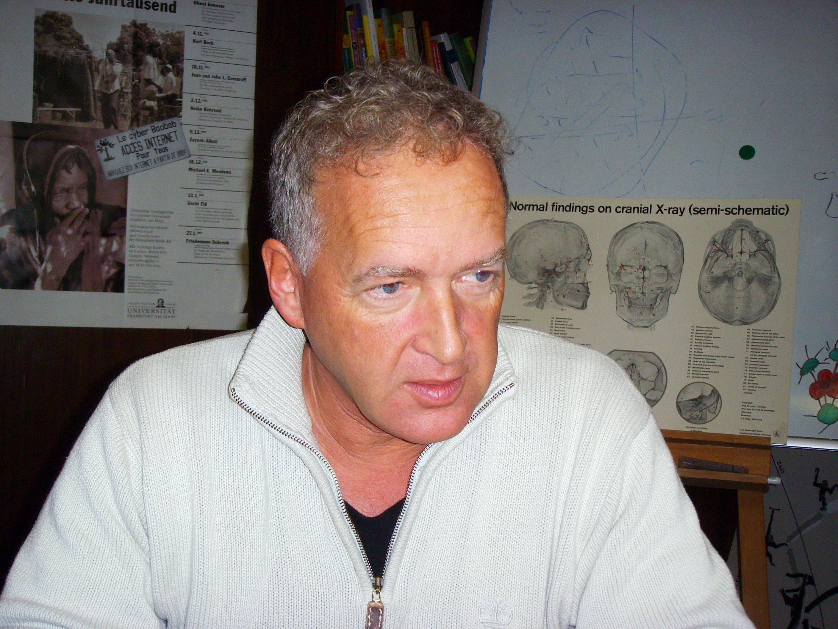 Prof. Friedemann Schrenk, German palaeoanthropologist. Senckenberg-Museum, Frankfurt am Main, Germany.